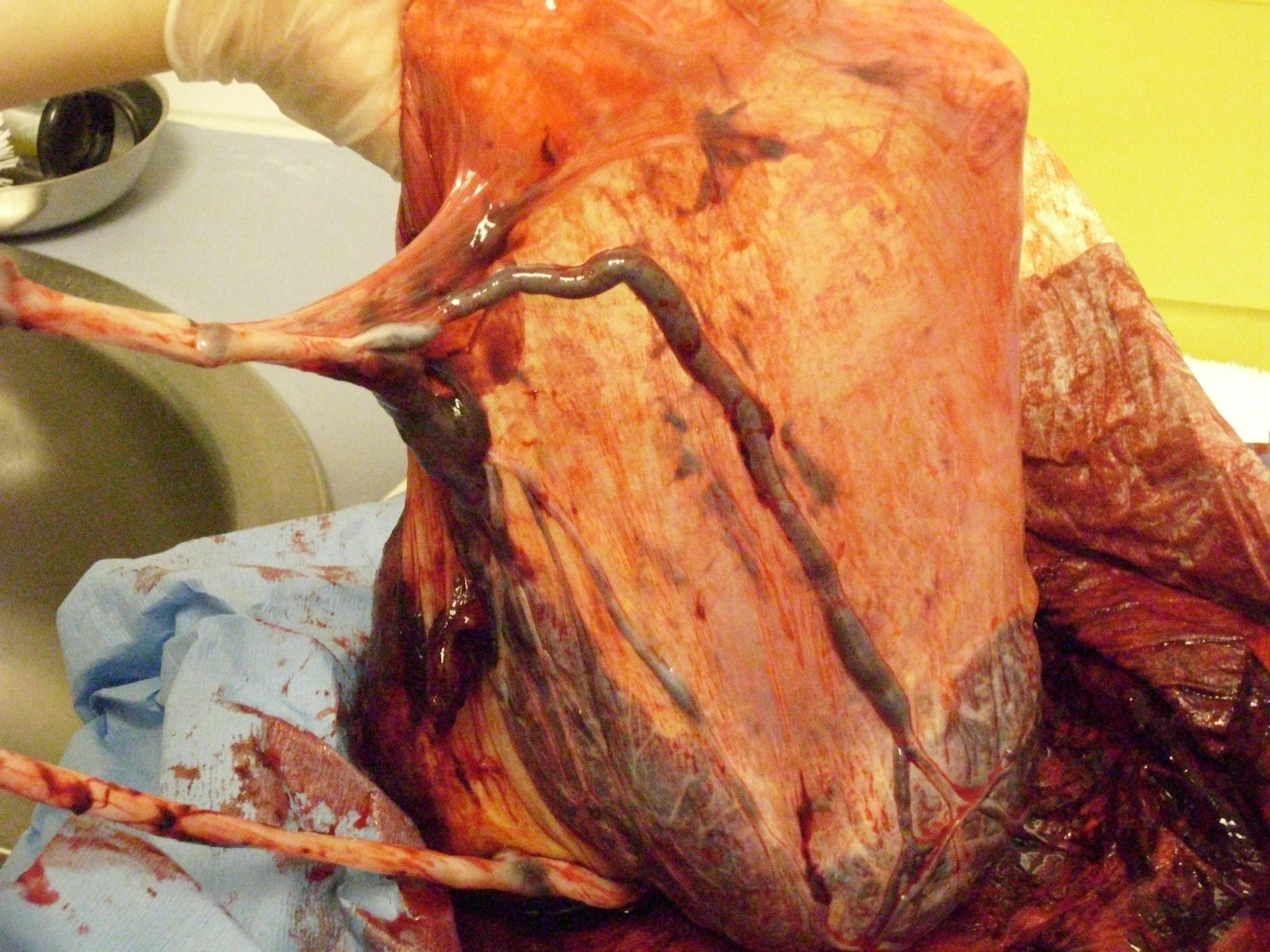 Placenta mit Insertio velamentosa: Nabelschnuransatz und Gefäßverlauf auf den Eihäuten